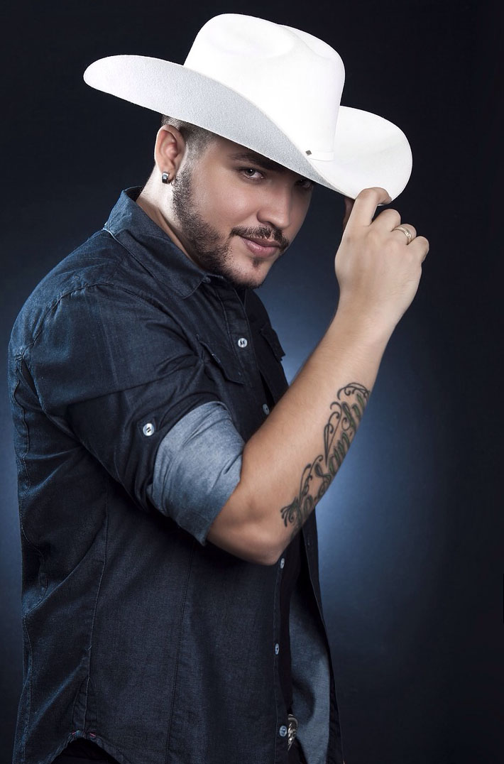 Cantante Colombiano de música norteña y popular.